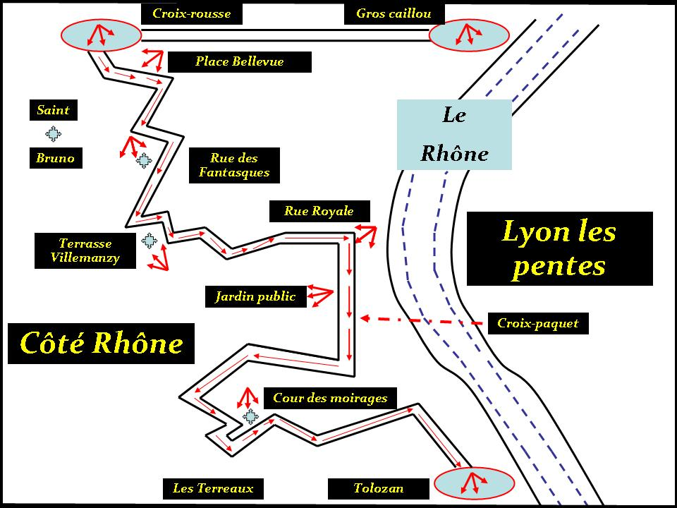 Lyon : schéma des Terreaux à la Croix Rousse